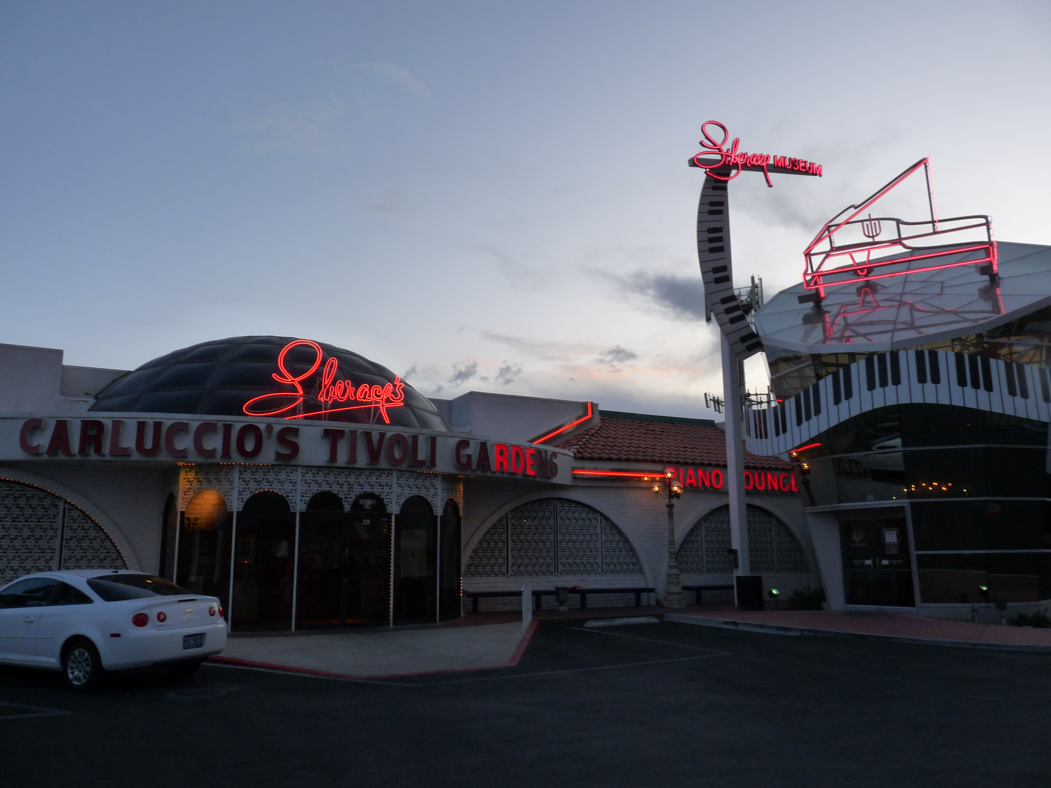 Liberace Museum - Las Vegas